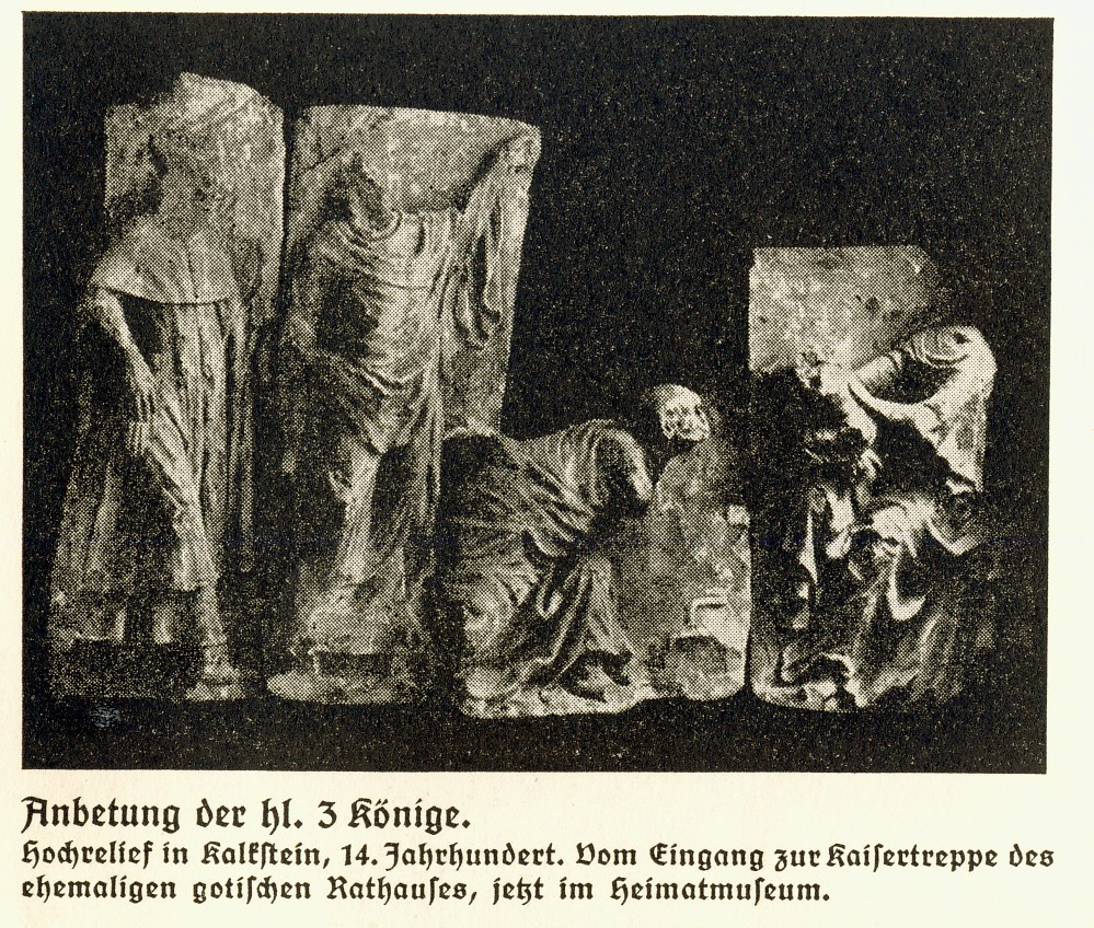 Dreikönigenrelief aus dem 14. Jh. von der Kaisertreppe des Aachener Rathauses, 1935 im Heimatmuseum, im 2. WK zerstört.